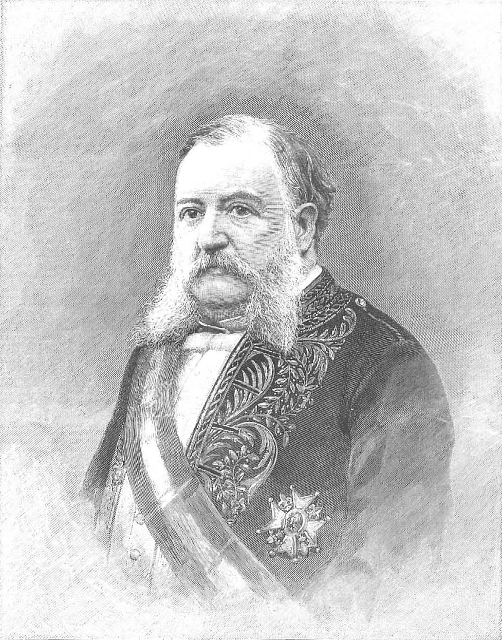 Excmo. Sr. D. Fermín Abella, Intendente de la Real Casa y Patrimonio, en la revista española La Ilustración Española y Americana.